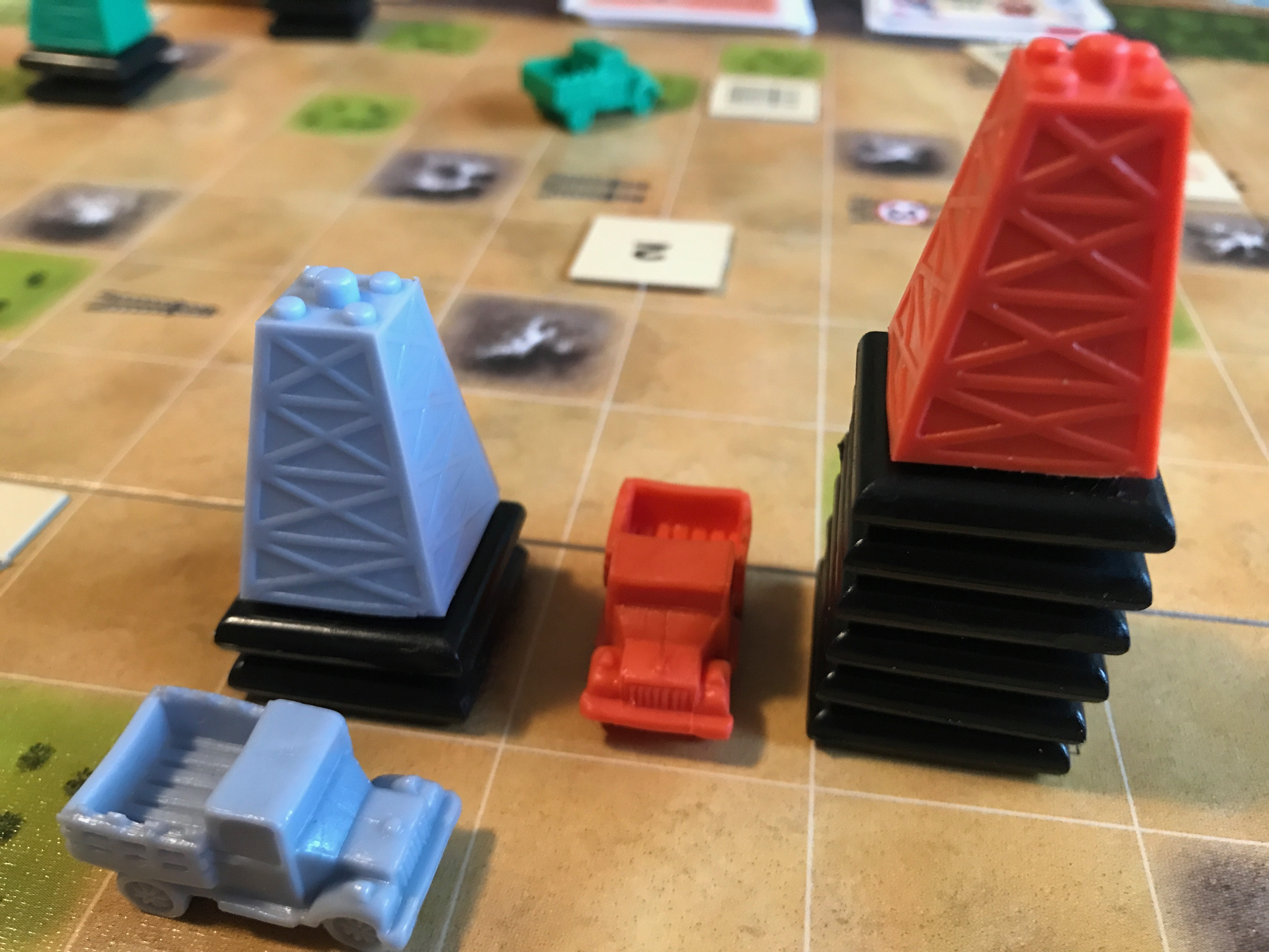 Spielmaterial des Brettspiels Giganten (1999)